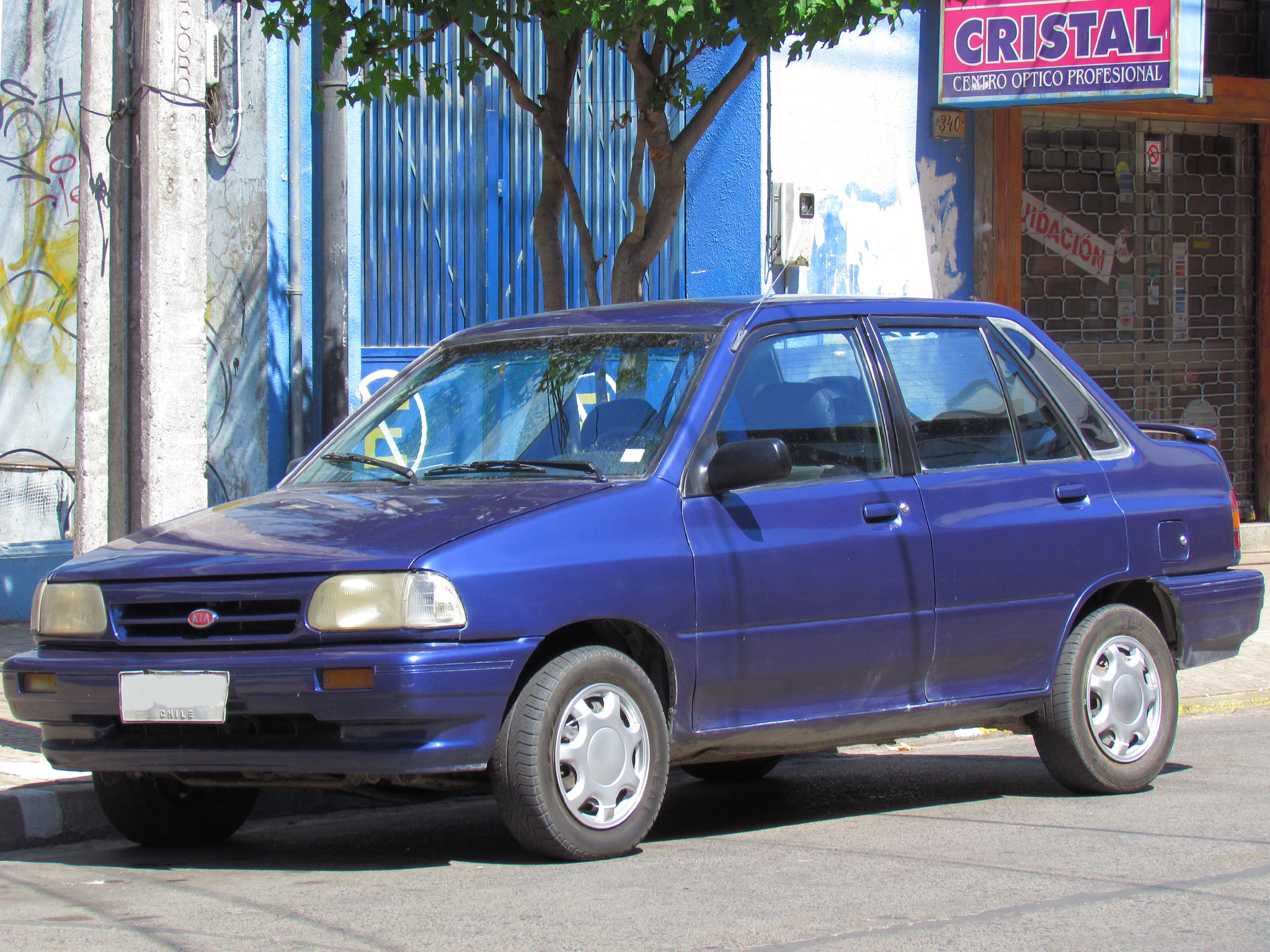 Kia Pride 1.3 GLS Sedan 1993